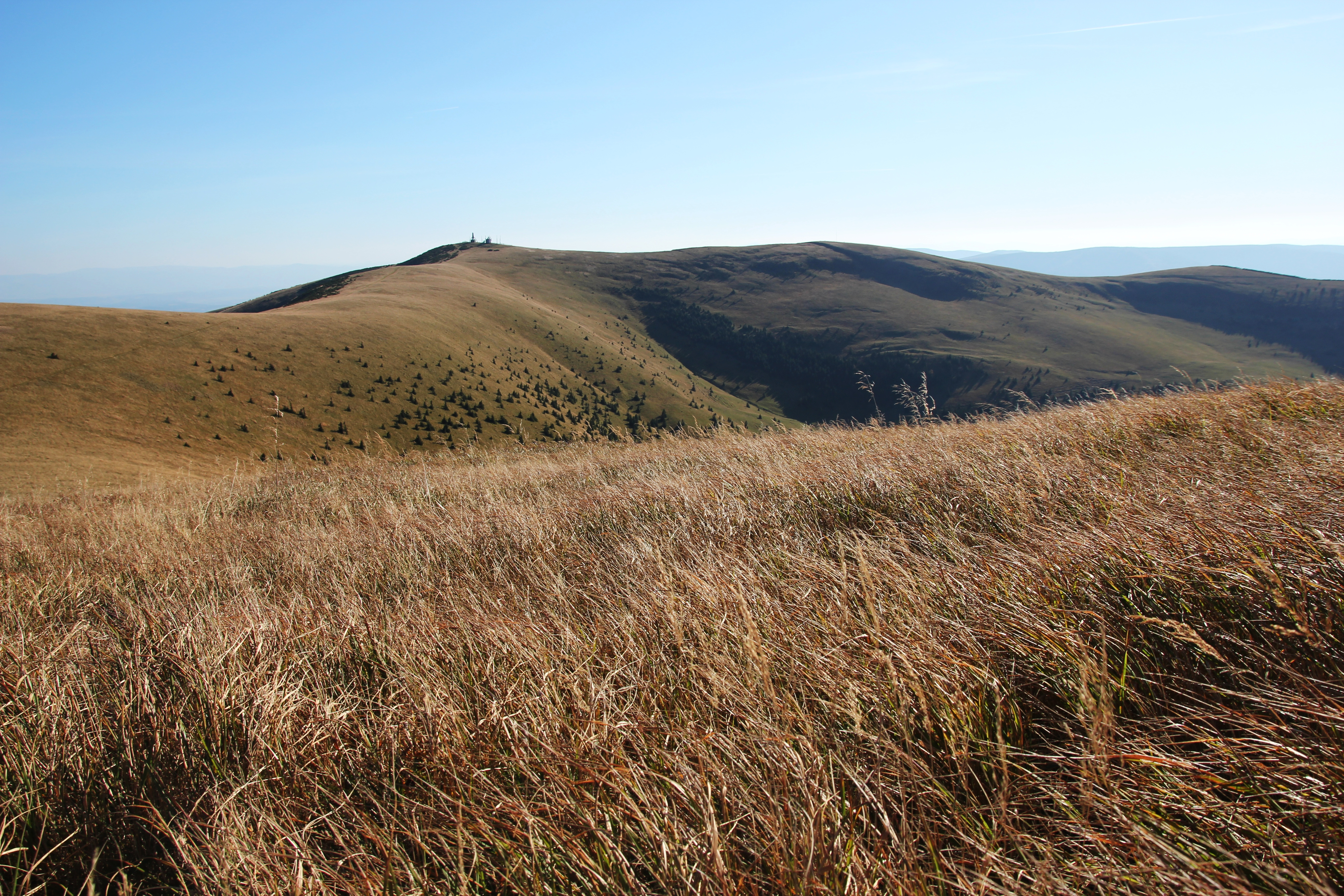 Masív Krrížnej